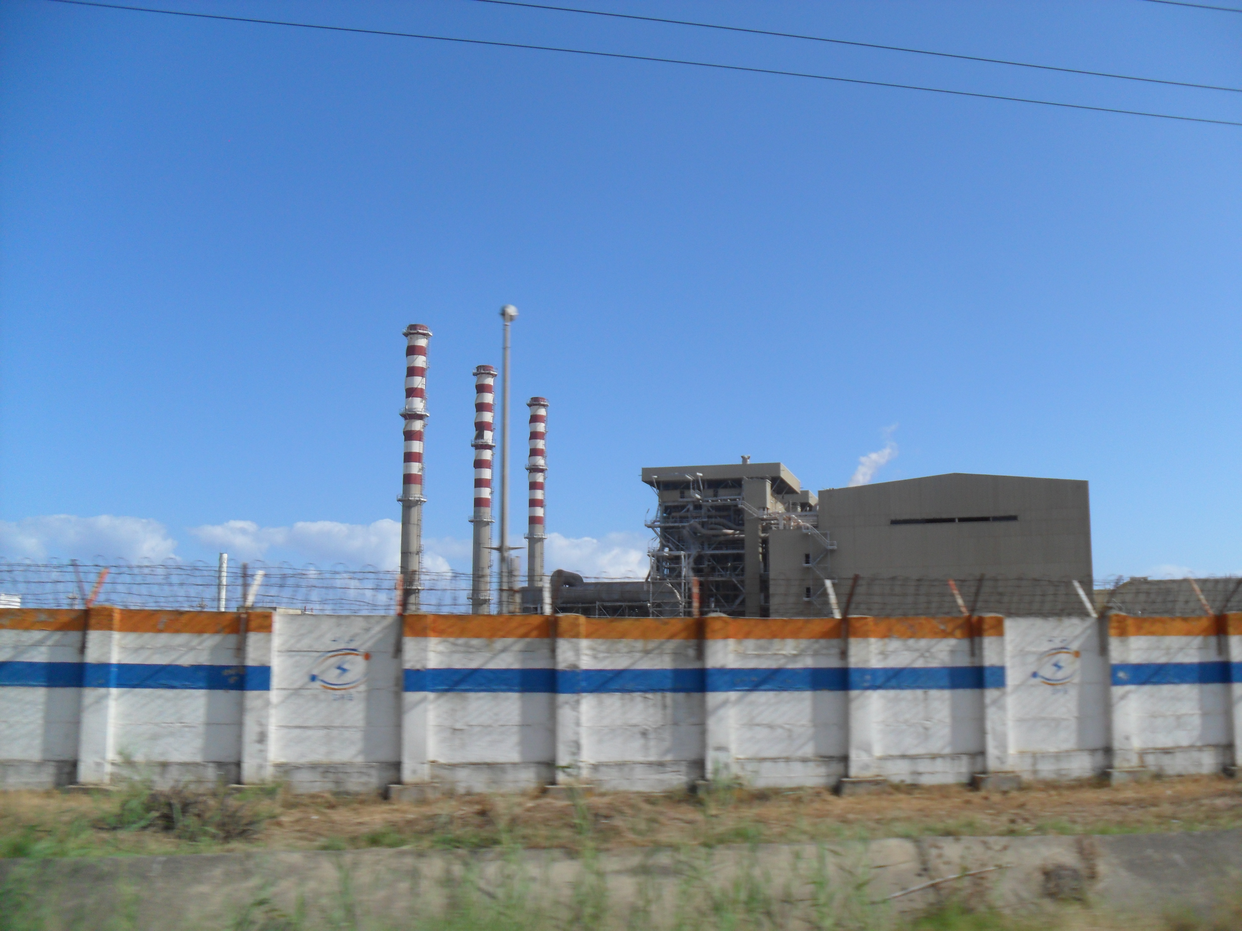 Centrale Electrique d'Achouat, Taher (Algérie)